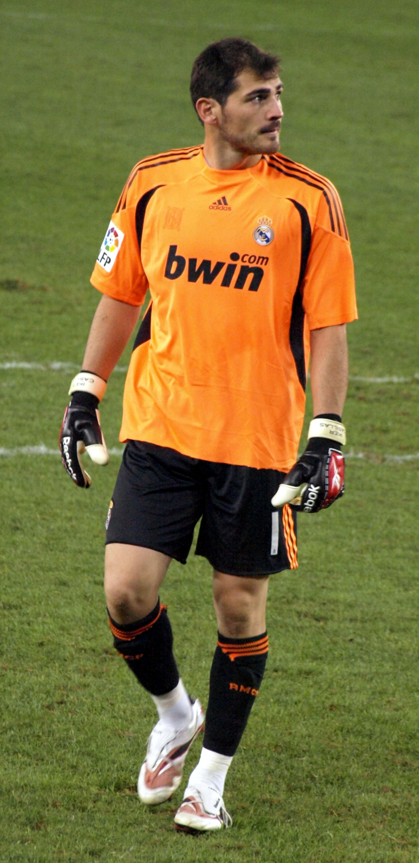 Iker Casillas en el partido que enfrentó al Real Madrid con el RCD Español en el Estadio de Cornellá-El Prat de la primera vuelta de La Liga 2009/10.